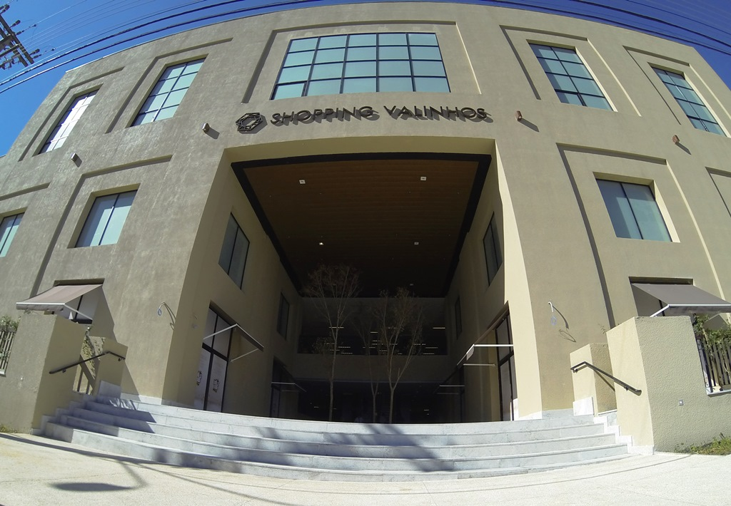 Nova fachada do Shopping Valinhos.